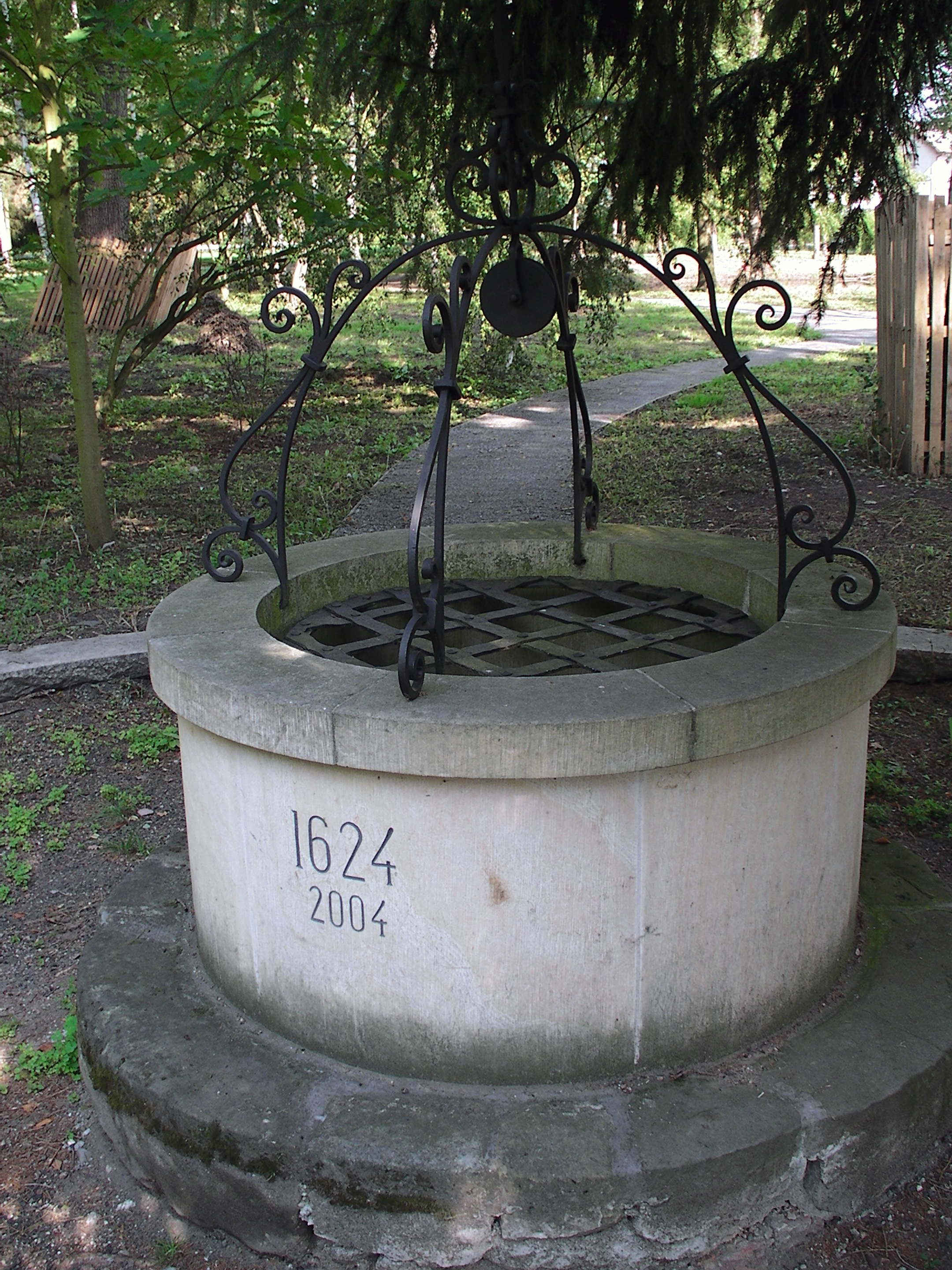 Komenského studna